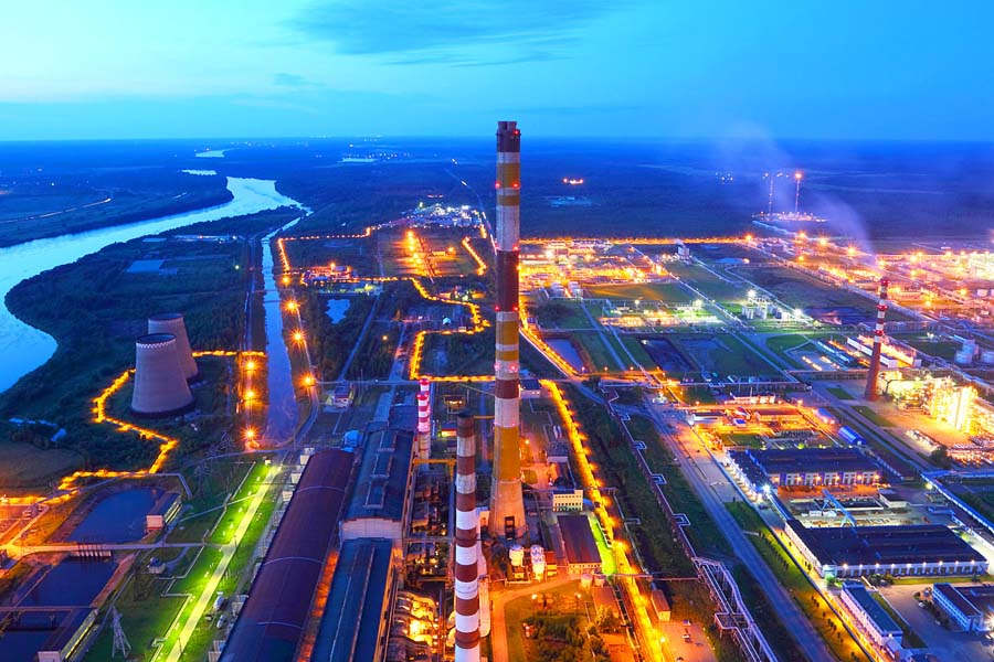 Вид Киришской ГРЭС ночью с высоты дымовой трубы 320 м